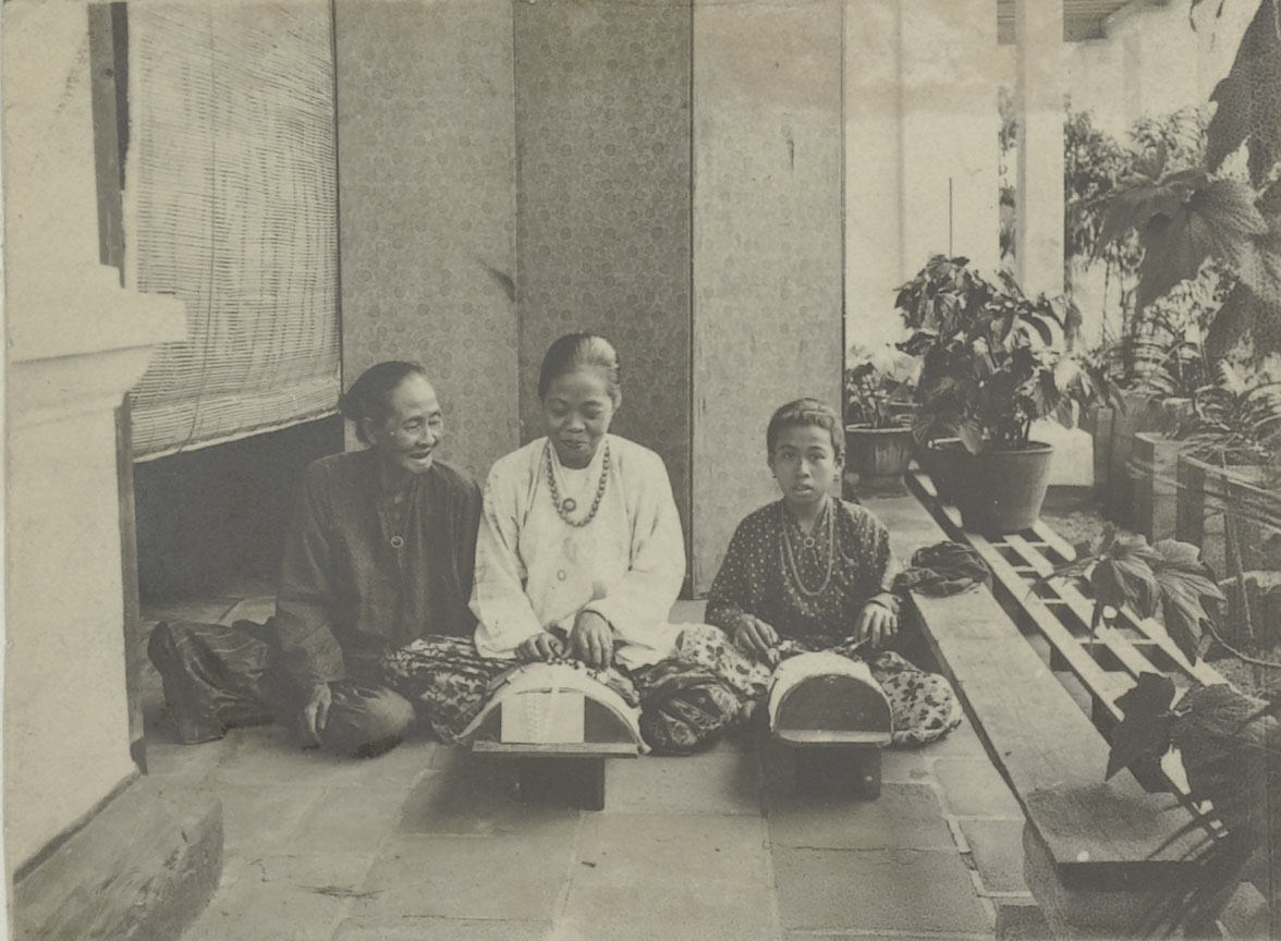 foto: Kantwerksters op Malakka